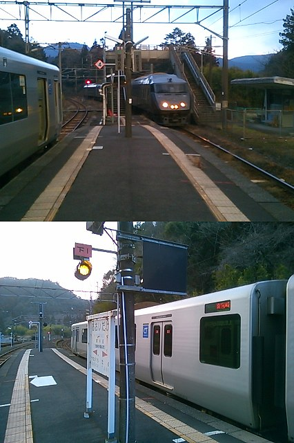 上は南宮崎方向を撮影。きりしま号との行き違い中。 下は西都城方向を撮影。